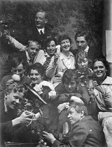 Viipurin taiteenystävien piirustuskoulun juhlat, ylimpänä Olli Miettinen 1914 - 1916